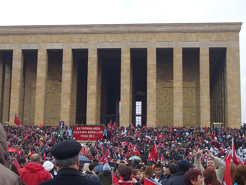 10 Kasım Atatürk'ü anma günü ve Atatürk Haftası. 2012 yılı, Ankara-Anıtkabir